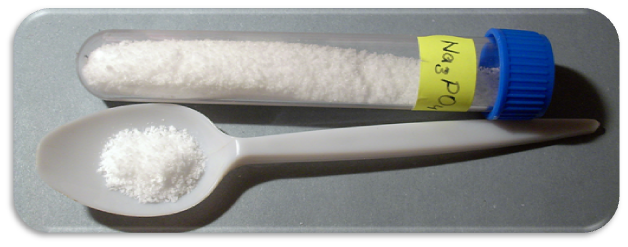 Fosforečnan sodný - Na3PO4